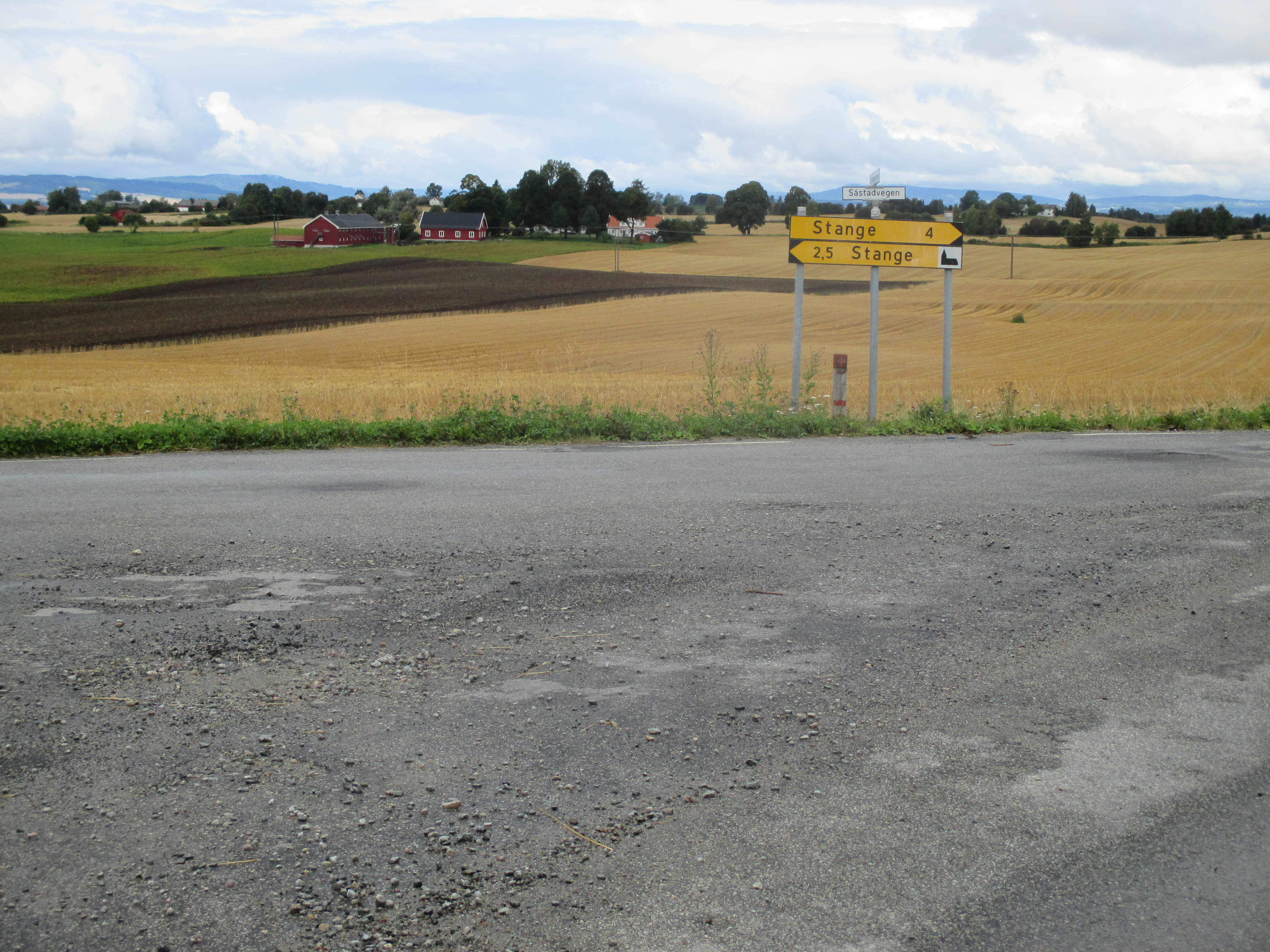 Såstadvegen der den skifter nummer fra 1866 (tidl. 200) til 1870 (tidl. 203), mens Ekebergvegen overtar 1866-nummeret